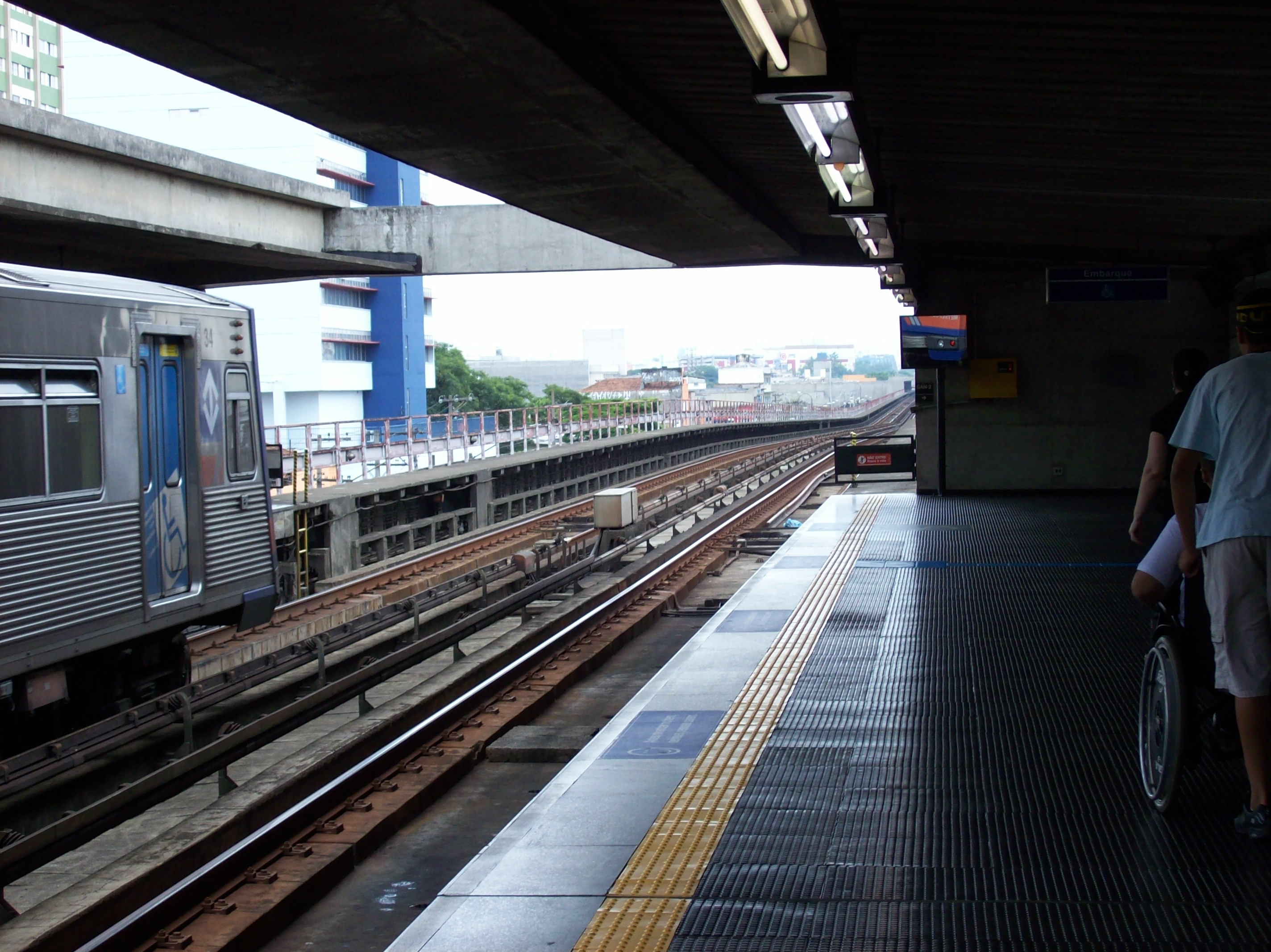 Foto da estação Santana, da linha 1 - Azul, do Metrô de São Paulo